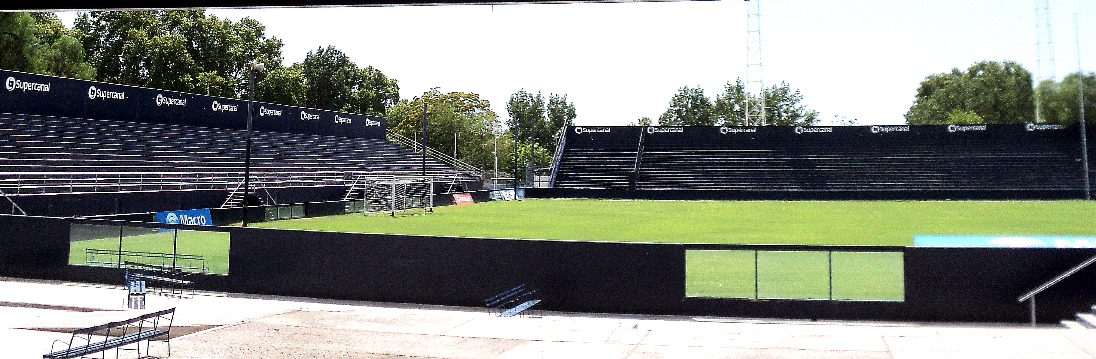 Club Sportivo Independiente Rivadavia Estadio